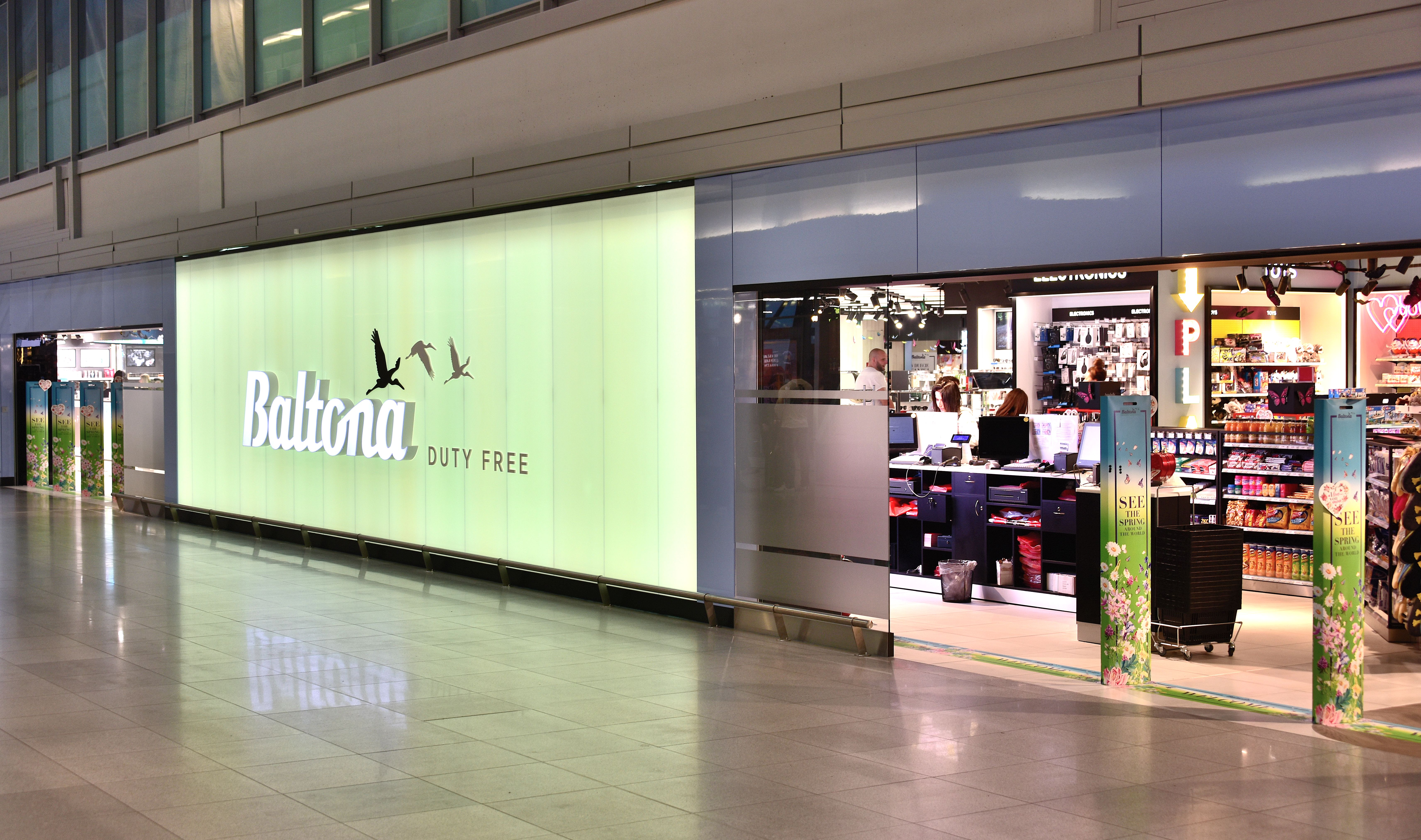 Sklep Baltony na Lotnisku Chopina w Warszawie